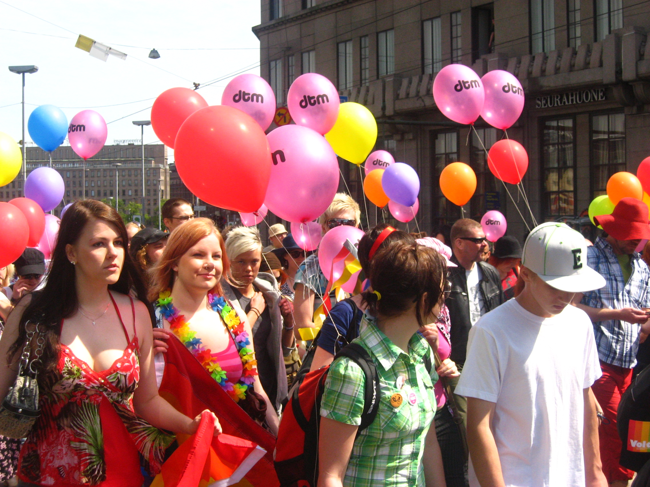 Helsinki Pride